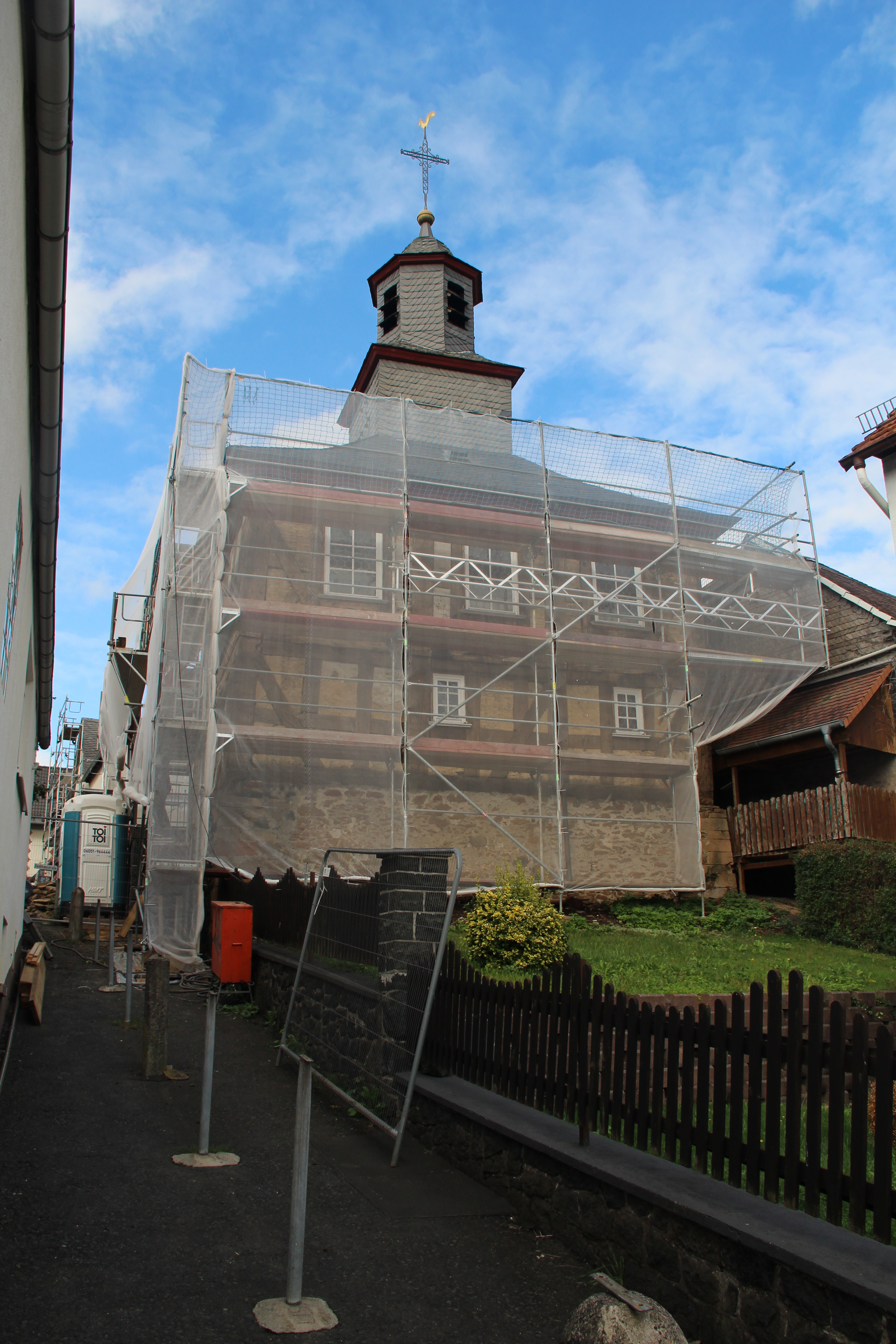 Die Kirche in Runzhausen. Eine der drei "Kaffeemühlenkirchen" im Landkreis Marburg-Biedenkopf.